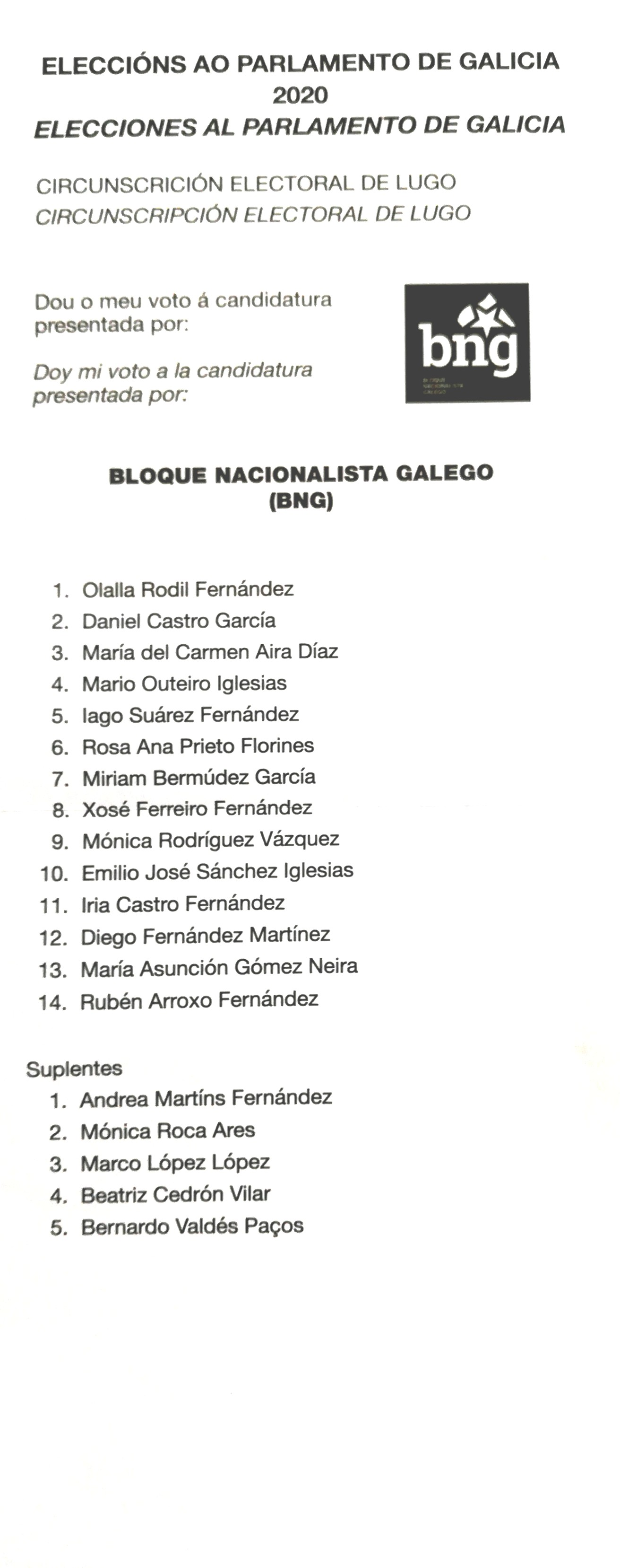 Papeletas electorais Eleccións ao Parlamento de Galicia 2020 pospostas circunscrición electoral de Lugo-BNG